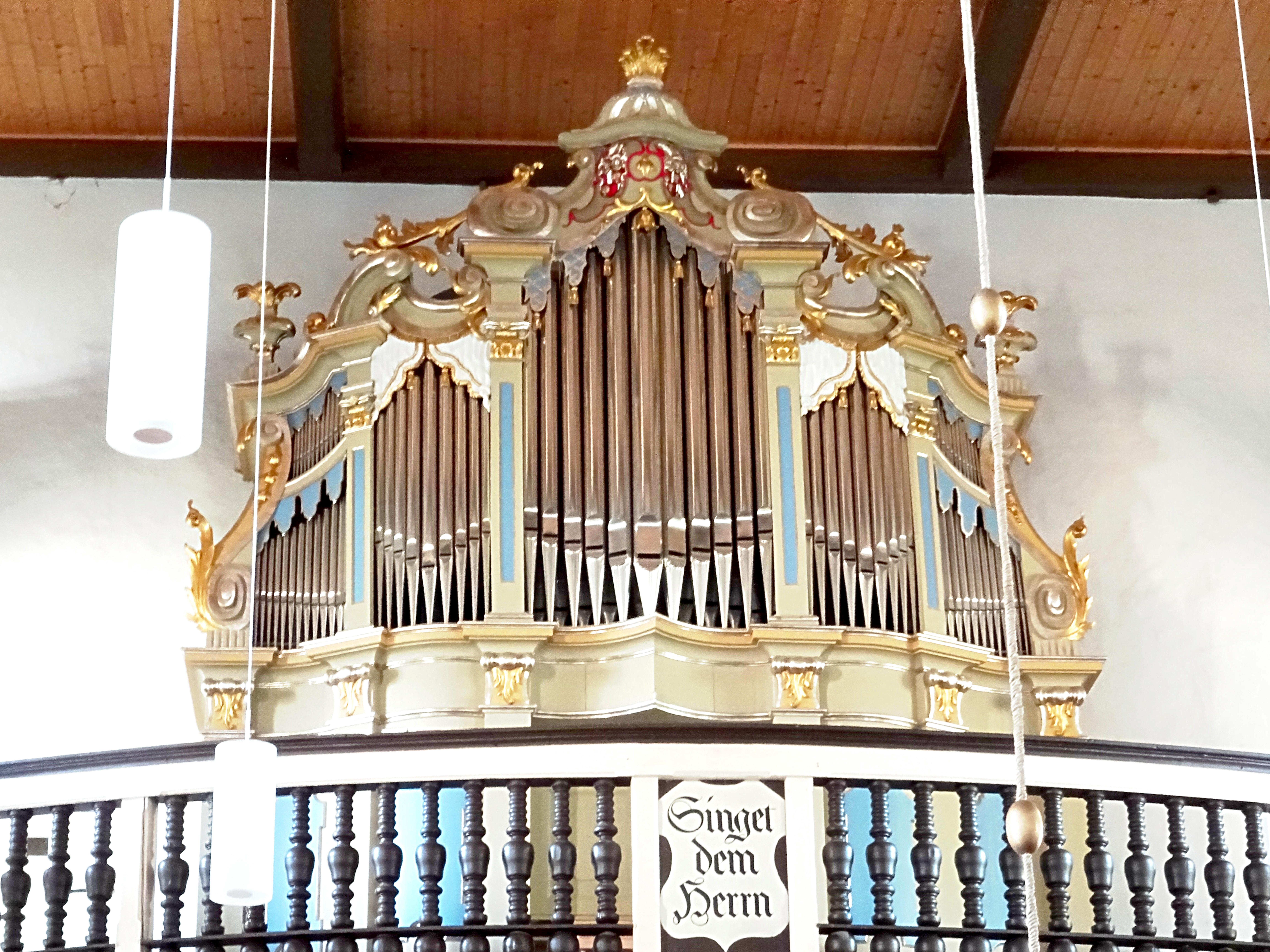 Geising: die evangelisch-lutherische Stadtkirche, Schon seit dem 15. Jahrhundert befindet sich am Ort der Geisinger Kirche eine Pfarrkirche. 1689 wurde sie als barocke, schlichte Hallenkirche mit dreistöckigen Emporen neu erbaut.